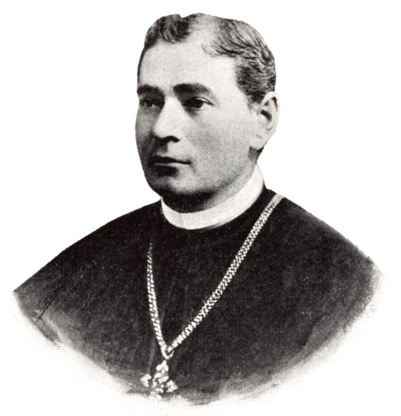 Csernoch János (1852-1927) esztergomi érsek, bíboros-hercegprímás